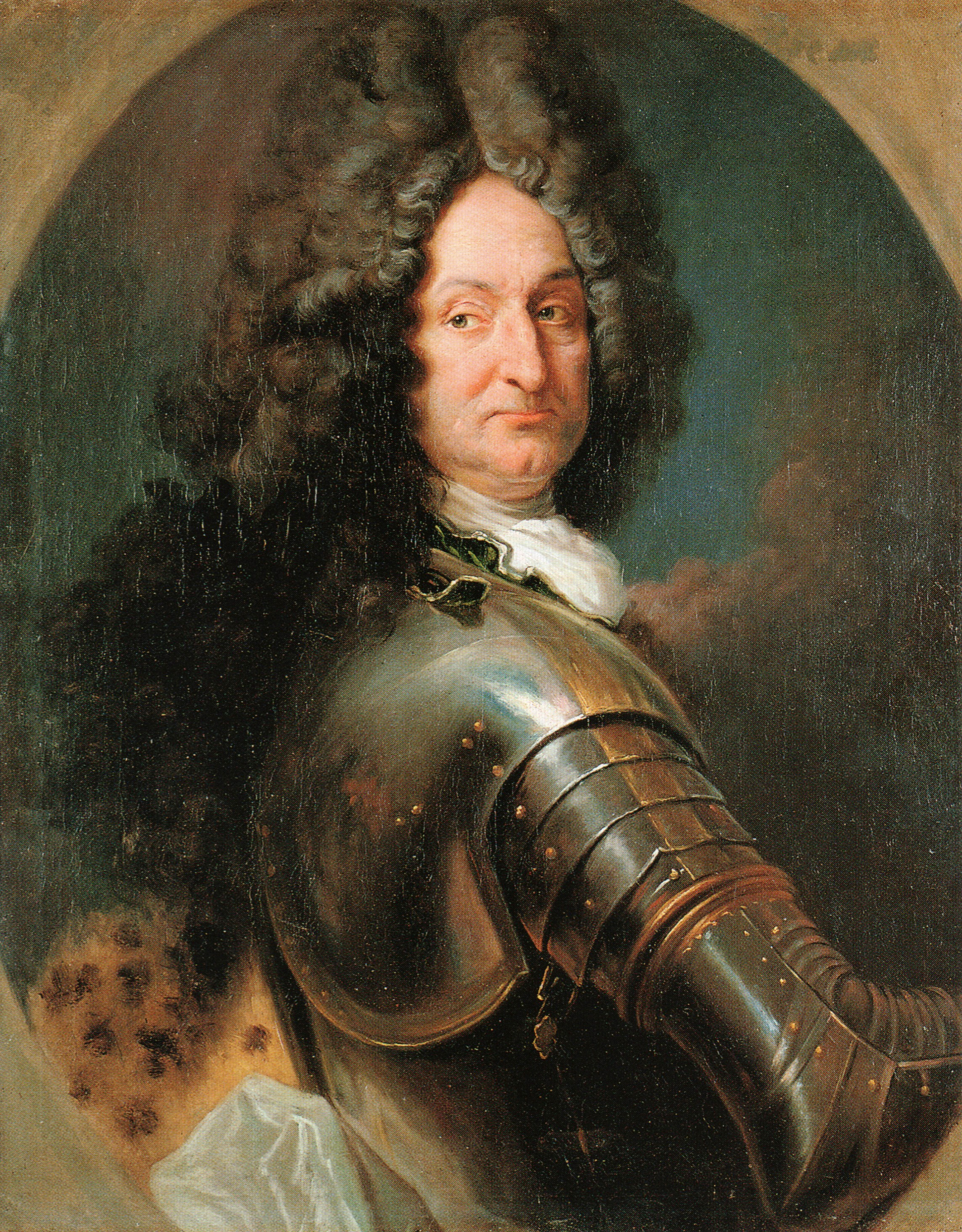 Theodor Giou de Briou (1649 - 1720).